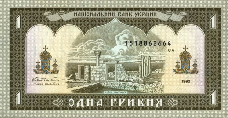 1 Hryvna, back, 1992 Ukraine.